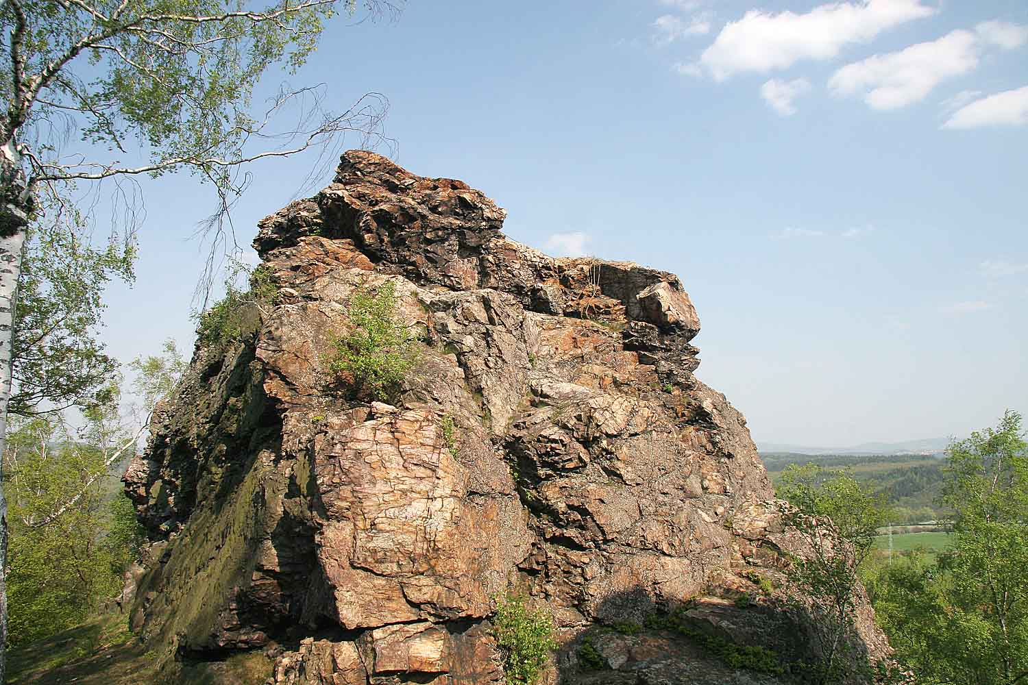 fotografie z PP Černolické skály u obce Černolice v okrese Praha-západ